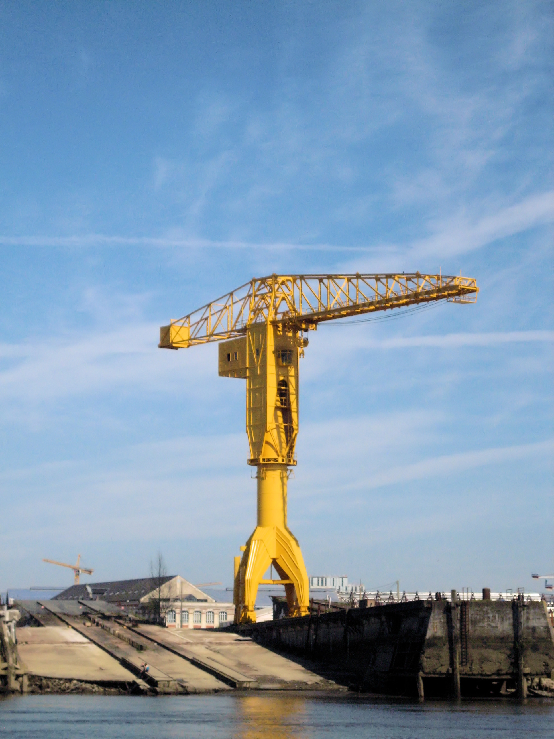 La Grue Titan jaune (ex-chantiers navals Dubigeon) sur l'Île de Nantes (France)